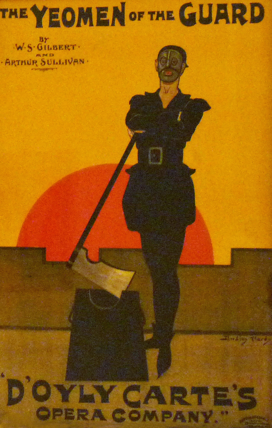 Dudley Hardy, affiche The Yeomen of the Guard, lithographie, Musée d'art moderne et contemporain de Strasbourg.